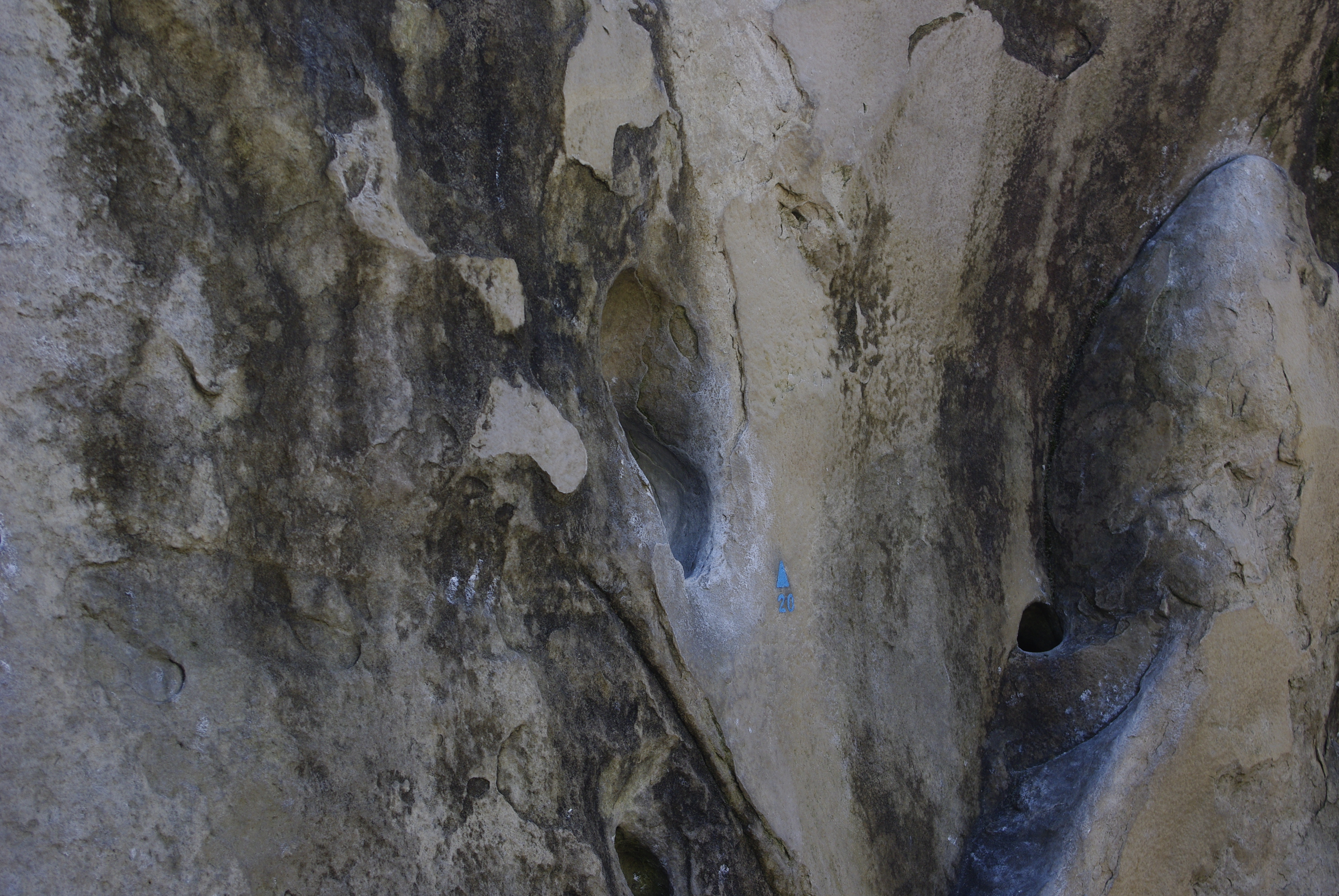 Мітка боулдерінгу у Фонтенбло.